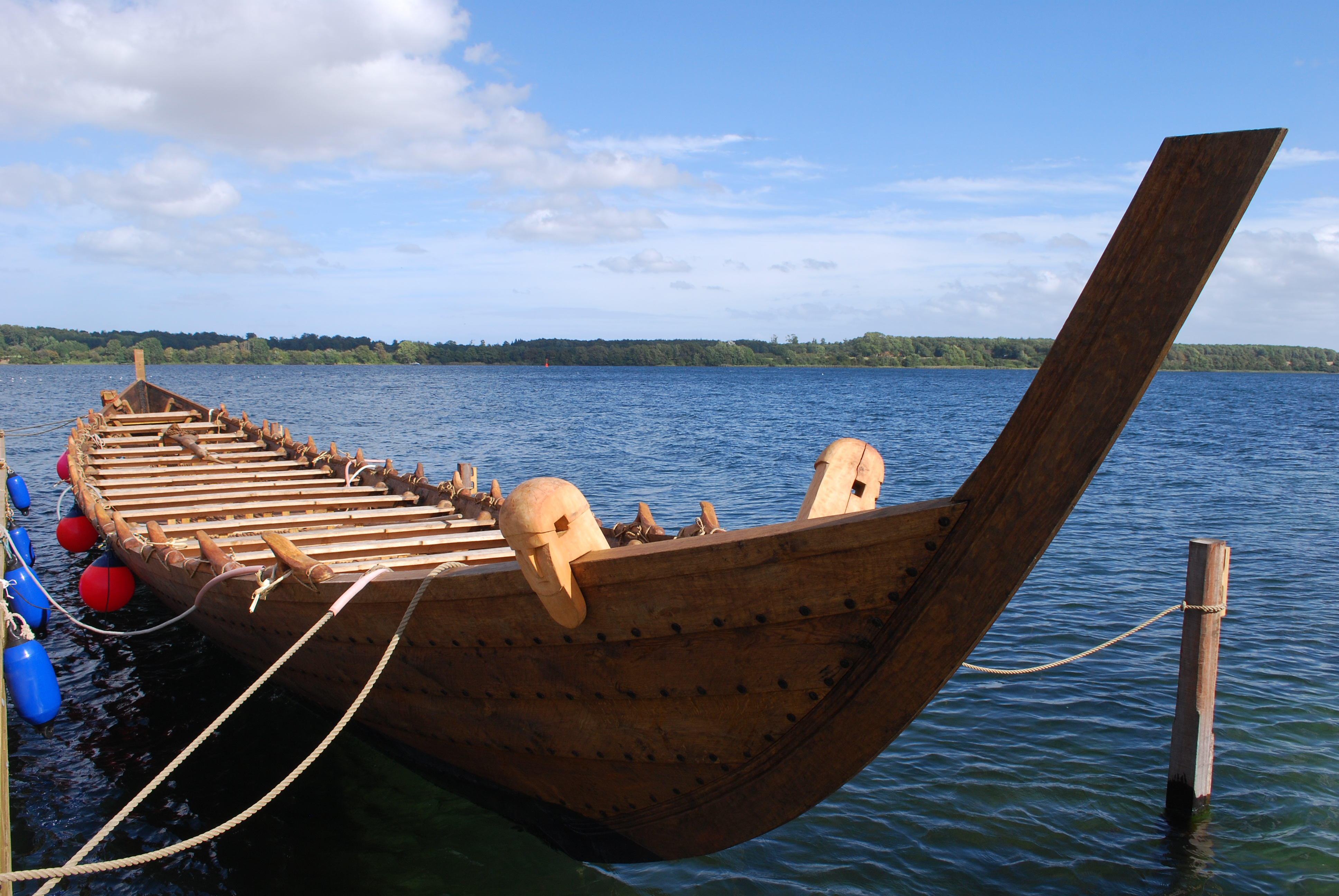 NYDAM TVEIR, Sottrupskov, Denmark